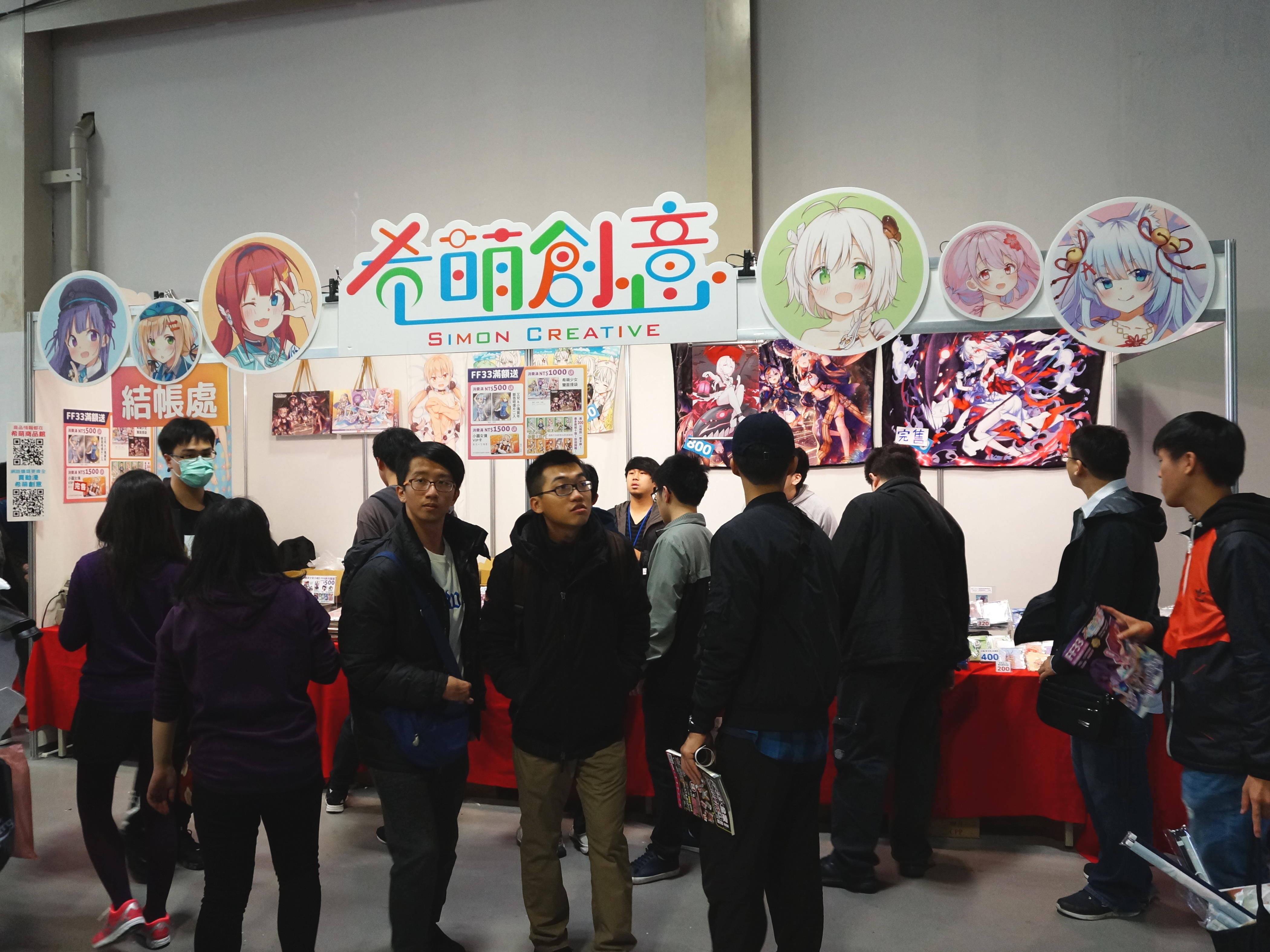 中文（台灣）: 第33屆開拓動漫祭，希萌創意攤位。